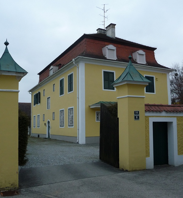 Ehemalige Villa der Unternehmerfamilie Kapsreiter in Schaerding